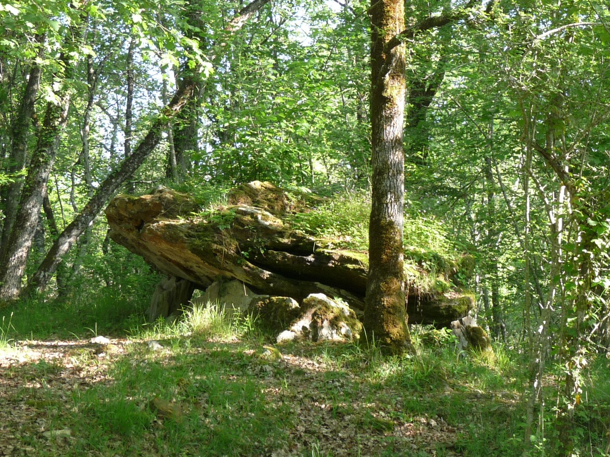 Dolmen de Pierre Rouge, Edon (Charente, France); vue du sud